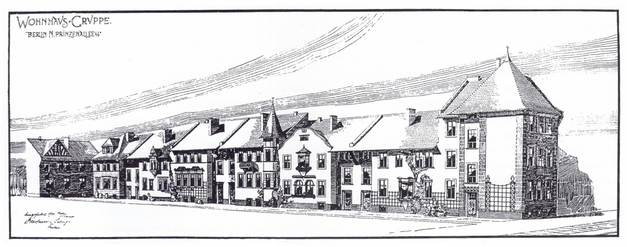 Perspektiv-Zeichnung der sogenannten „Roten Häuser“, einer Zweifamilienhaus-Zeile in Berlin-Gesundbrunnen, Prinzenalle 46A-46H; erbaut 1901 nach Entwurf von Alfred Breslauer und Paul Salinger im Auftrag von Hugo Heimann; im Zweiten Weltkrieg zerstört